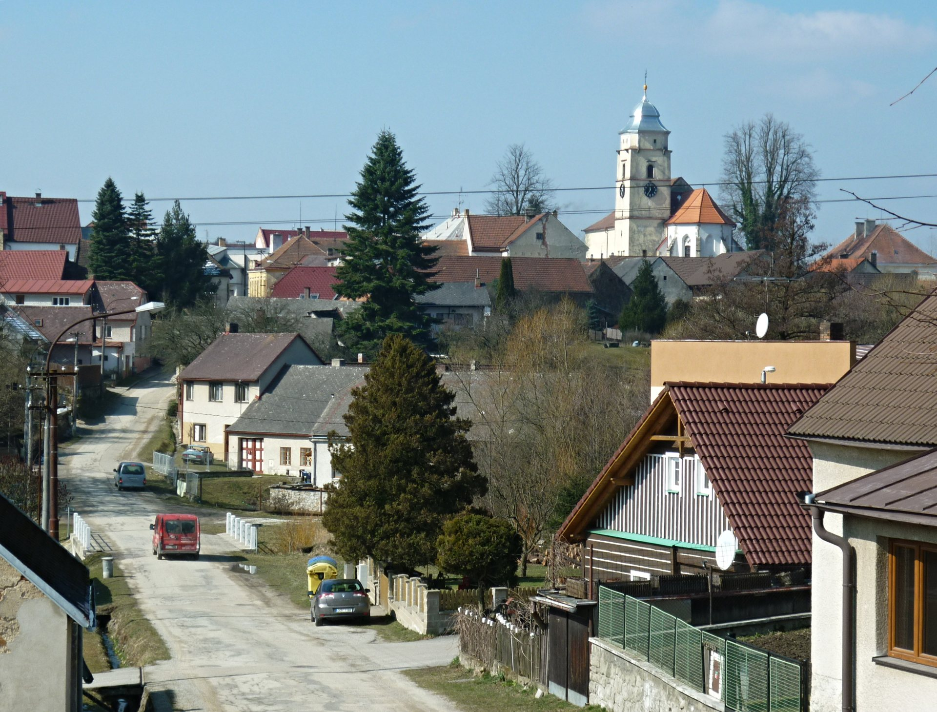 Kunžak - celkový pohled